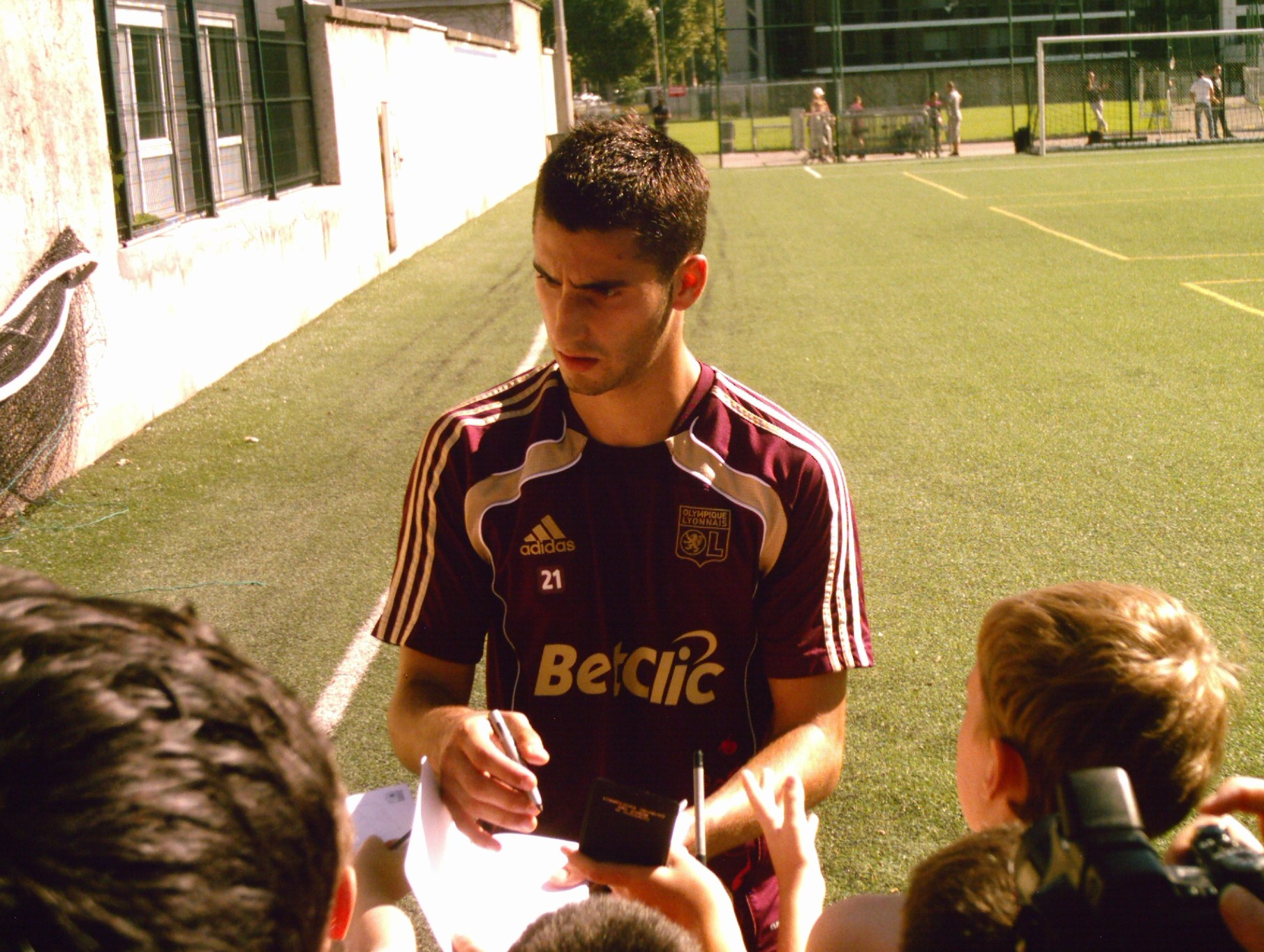 Maxime Gonalons signant des autographes à la fin d'un entrainement avec l'Olympique lyonnais.